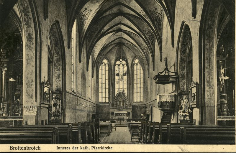 Bottenbroich, ehemalige Kirche